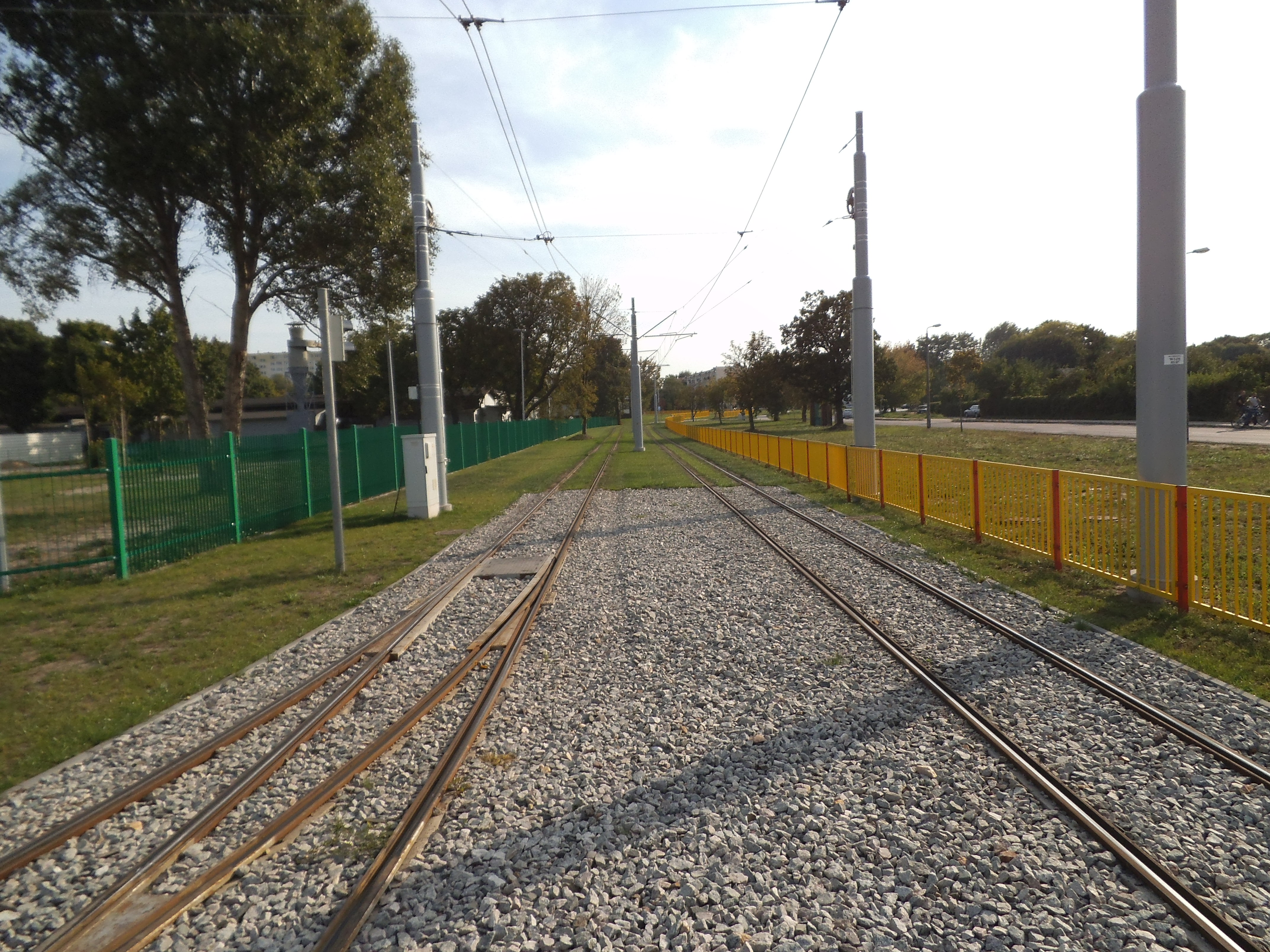 Nowe torowisko tramwajowe w Toruniu , Bielany ul Okrężna